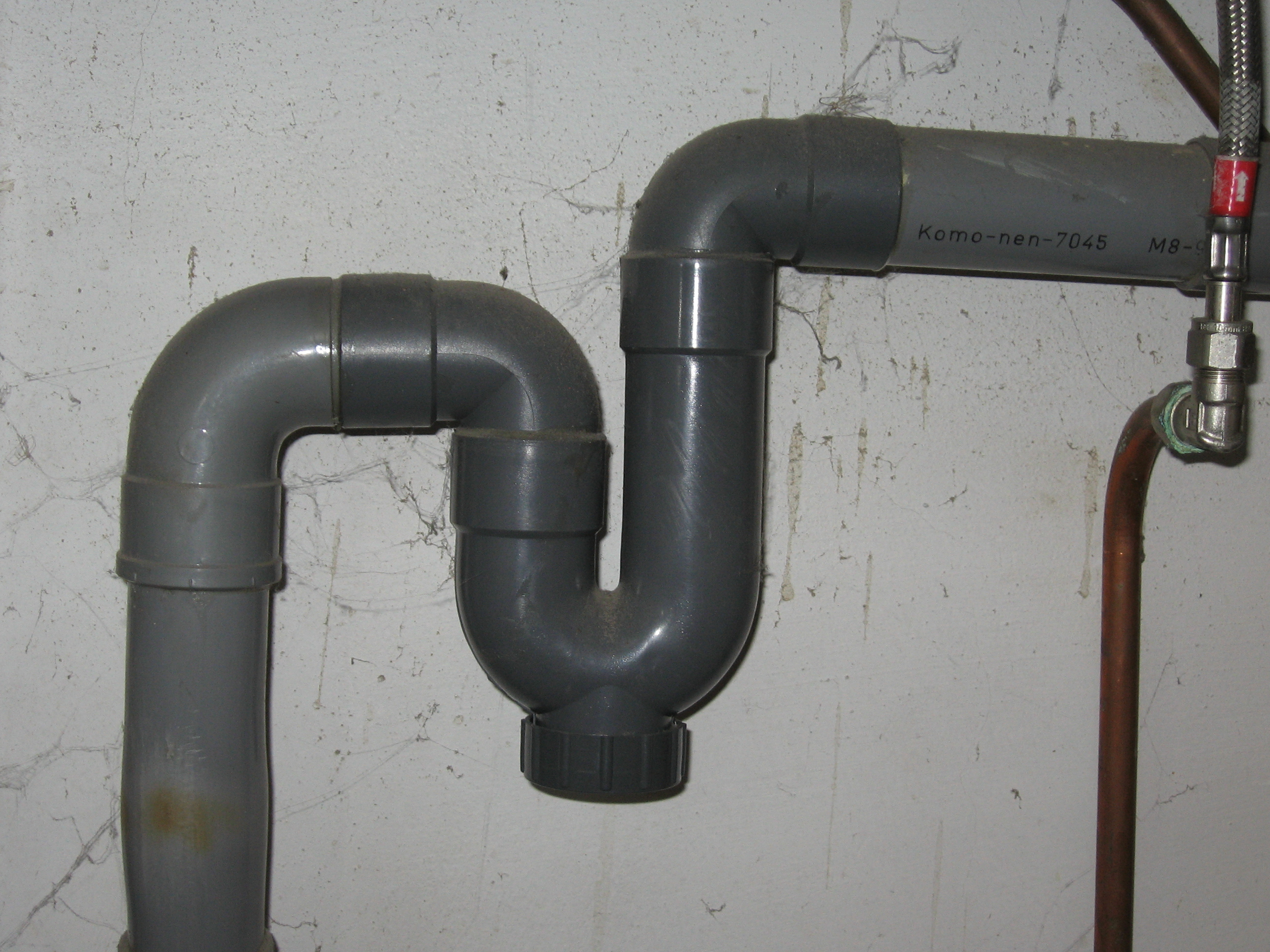 Siphon under sink.